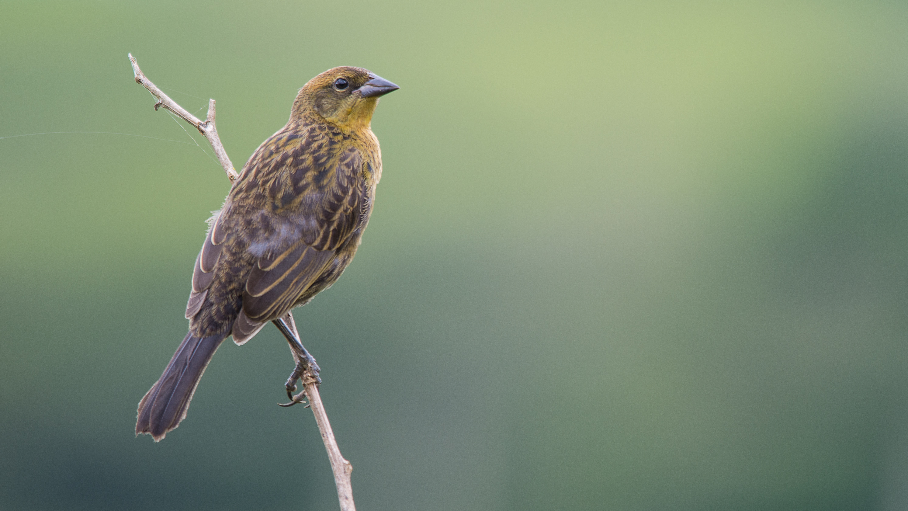 Espécie fêmea. Registro efetuado em uma mata próxima à Analândia-SP dia 19/01/2016. Nome Científico: Chrysomus ruficapillus. Nome Inglês: Chestnut-capped Blackbird. O macho possui plumagem negra com a parte superior da cabeça, peito e garganta em vermelho fosco. A fêmea possui cores pardo-olivácea. Ave típica de brejos e alagados. Alimenta-se basicamente de frutas, sementes, grãos e pequenos artrópodes. Aprecia arroz com casca. Ocorre nos estados do Amapá, Amazonas, Mato Grosso do Sul, Minas Gerais, Goiás, Rio de Janeiro, São Paulo, Paraná, Santa Catarina, Rio Grande do Sul, Tocantins, Distrito Federal e todos os estados do Nordeste. A União Internacional para a conservação da natureza classifica essa espécie como pouco preocupante (risco de extinção).